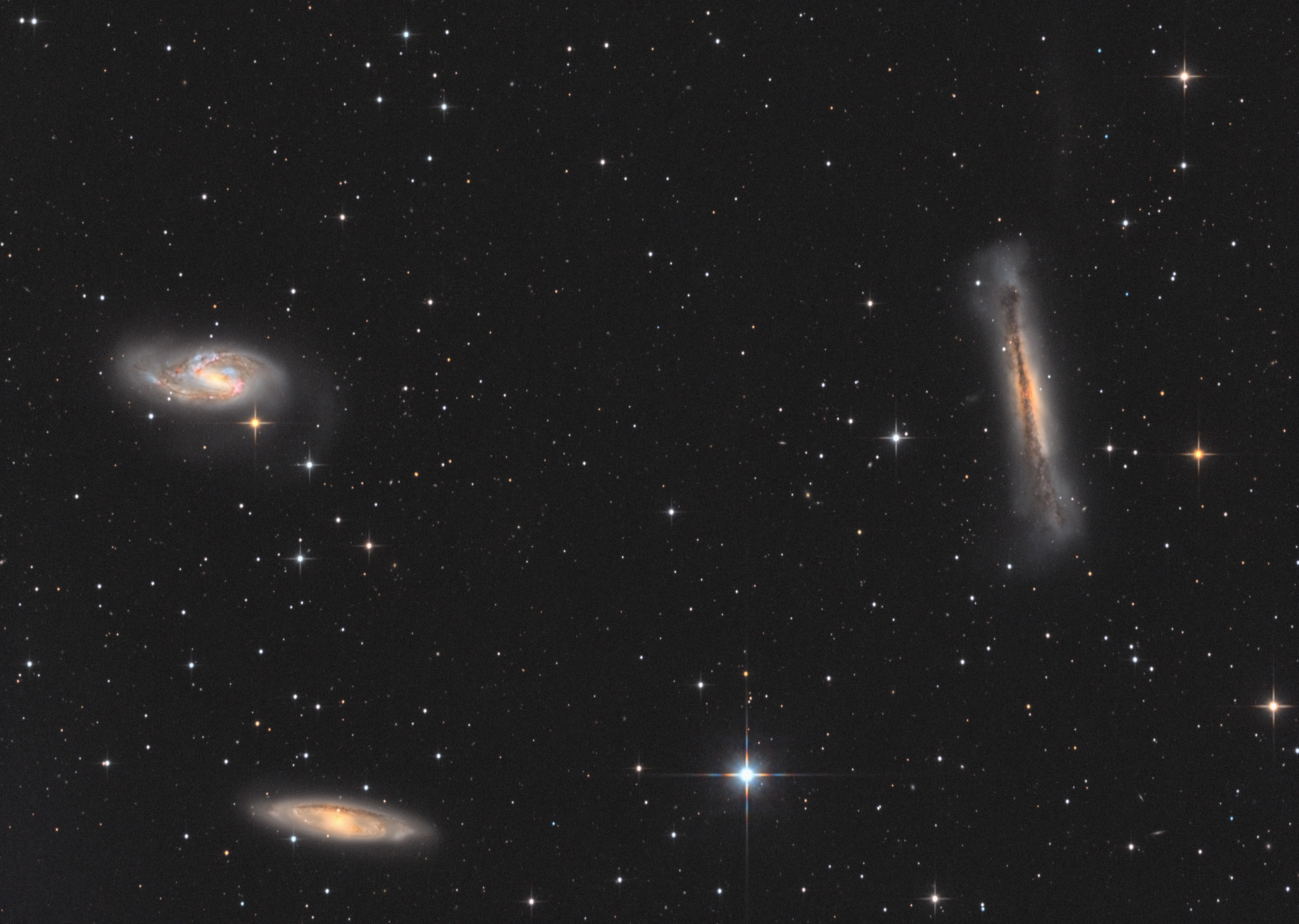 pořízeno amatérským dalekohledem z města. expozice cca 12hodin